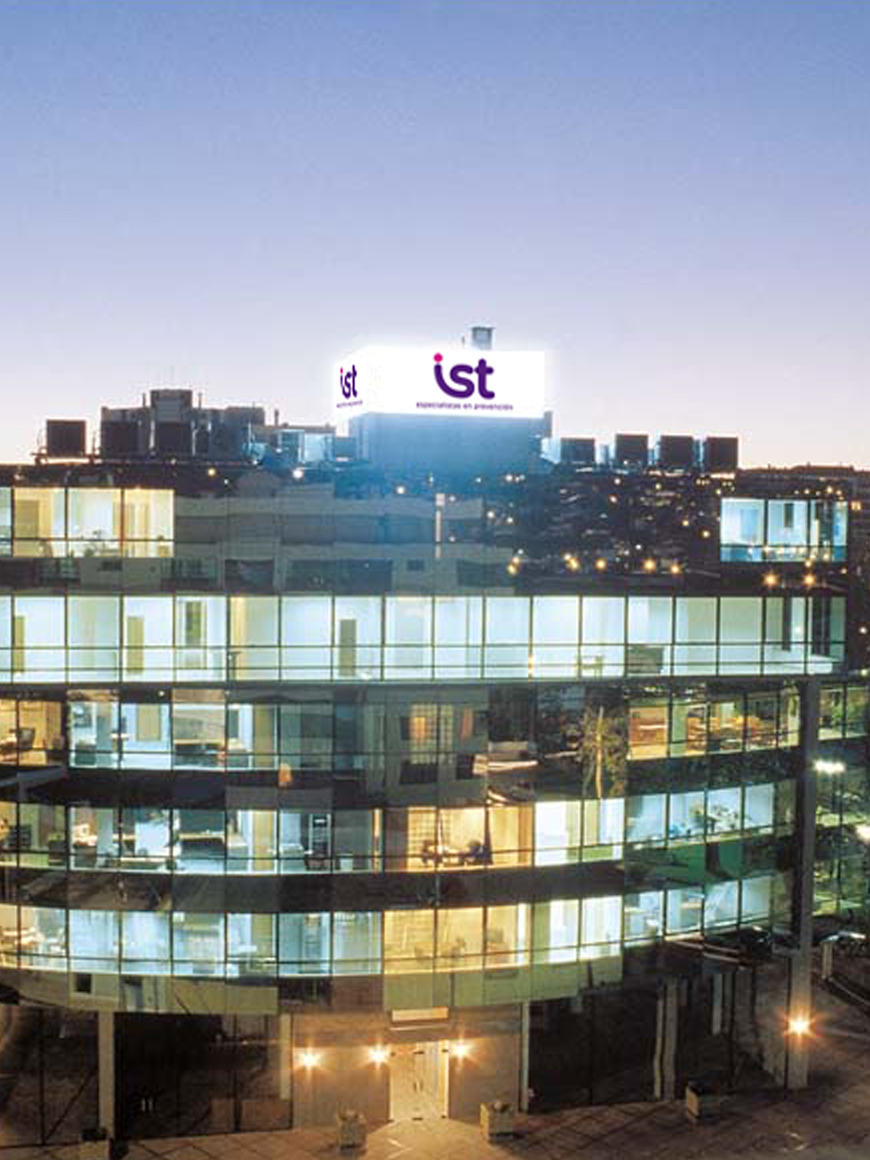 Sede Instituto de Seguridad del Trabajo IST